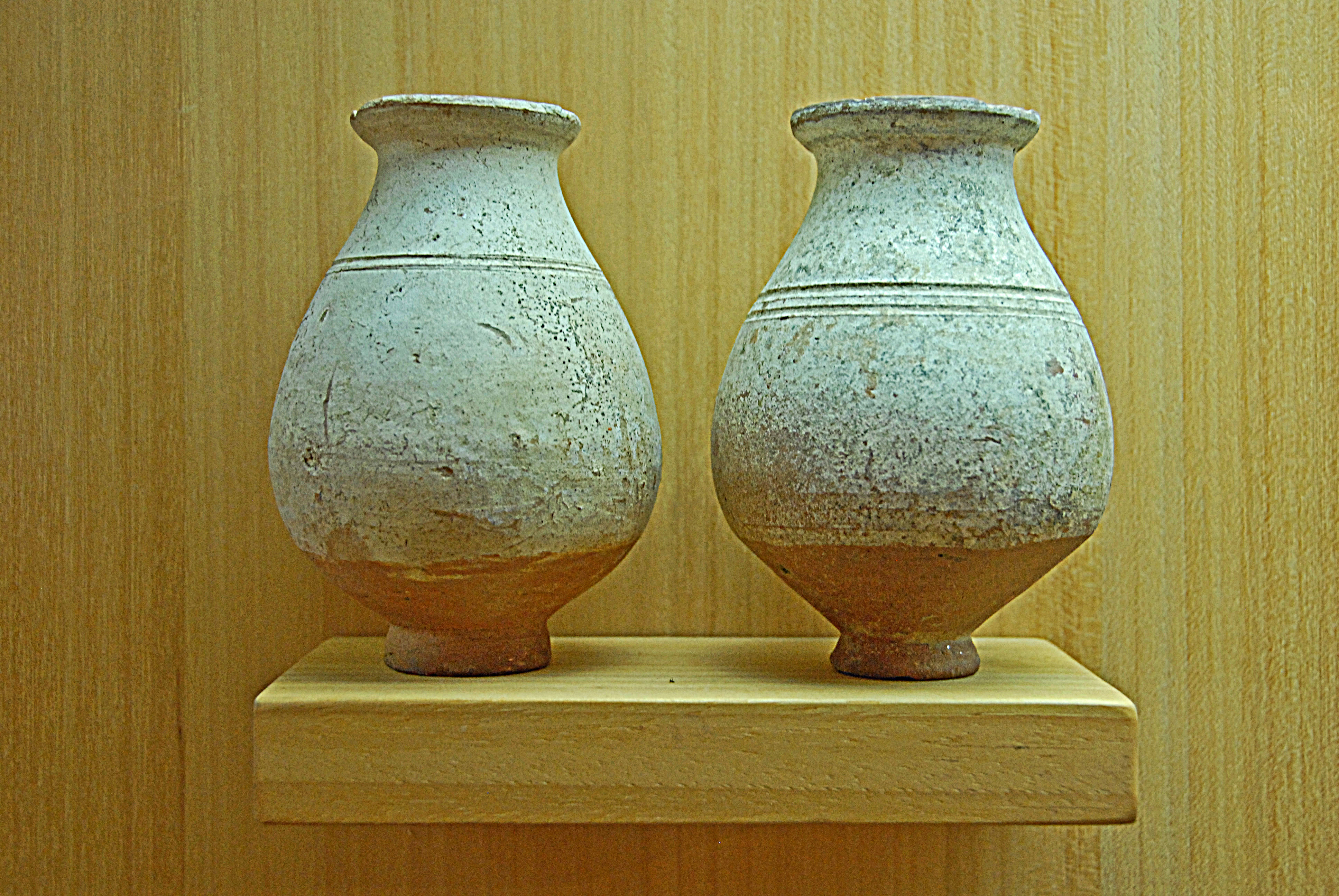 Civaux, Museum, Keramikgefäße